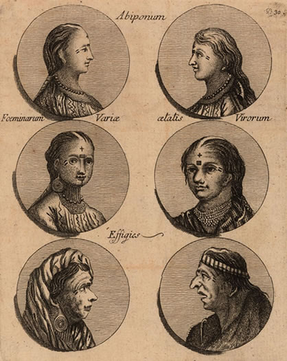 不同年齡的阿比坡呢族人畫像